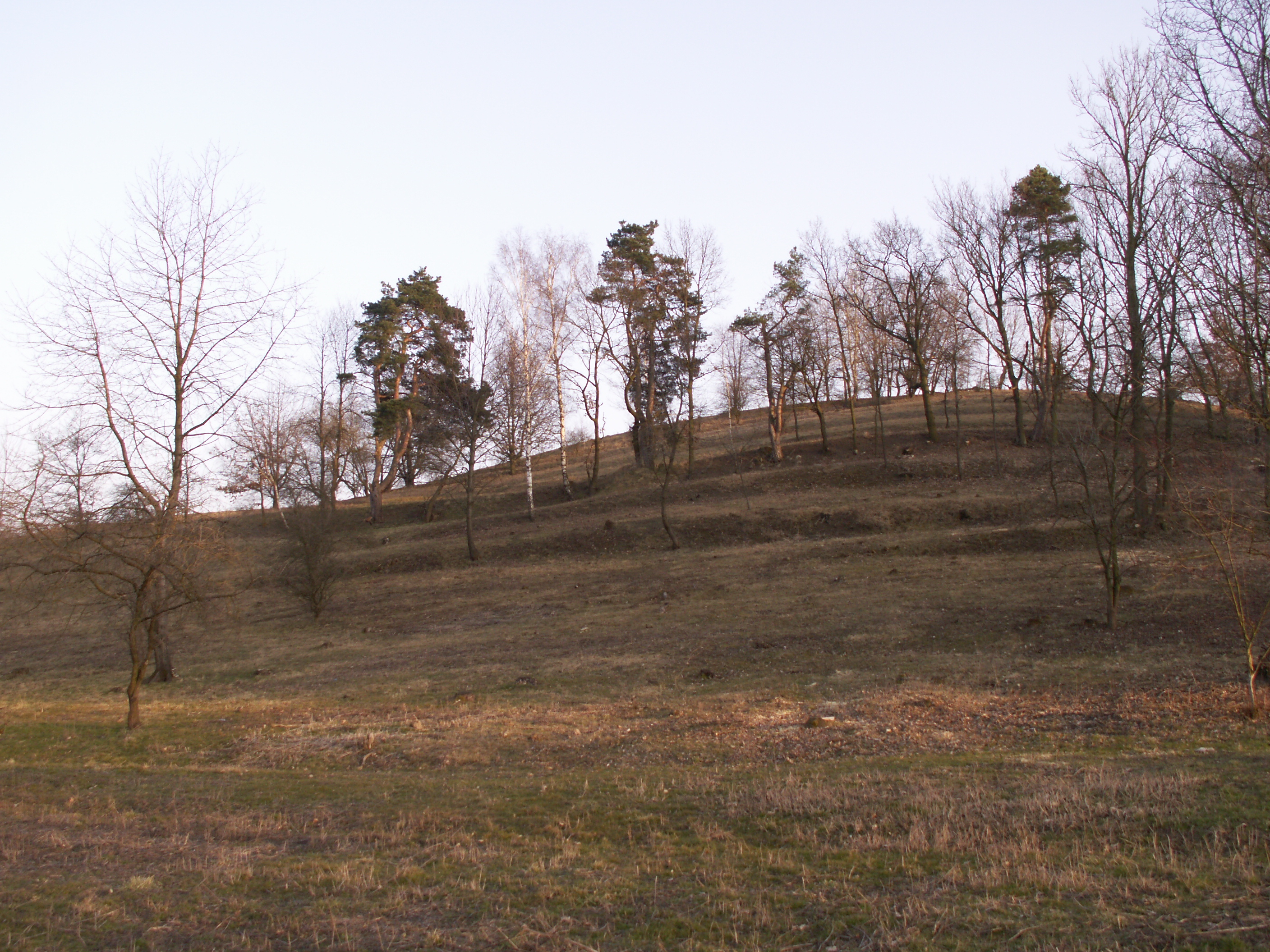 přírodní památka Pahorek, okres Vyškov